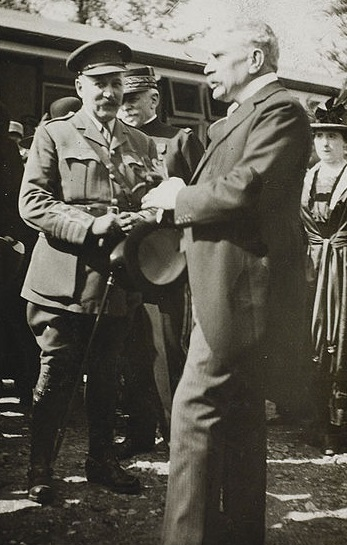 Title / Titre : Joinville-le-Pont - Cont. Sir Robt Borden, Col. Beauchamp, O.C. / Joinville-le-Pont - suite - sir Robert Borden, le col Beauchamp, cmdt. Creator(s) / Créateur(s) : Unknown / Inconnu Date(s) : July 3, 1918 / Le 3 juillet 1918 Reference No. / Numéro de référence : e007151027, MIKAN 1965681 Location / Lieu : Joinville-le-Pont, France Credit / Mention de source : Unknown. Library and Archives Canada / Inconnu. Bibliothèque et Archives Canada. Description / Descriptions : Sir Robert Borden (right) with Colonel Georges Beauchamp at the official opening ceremony of No. 6 Canadian General Hospital, Joinville-le-Pont, France. / Sir Robert Borden (à droite), en compagnie du colonel Georges Beauchamp, à la cérémonie de l'ouverture officielle de l'Hôpital général canadien no 6, Joinville-le-Pont, France.